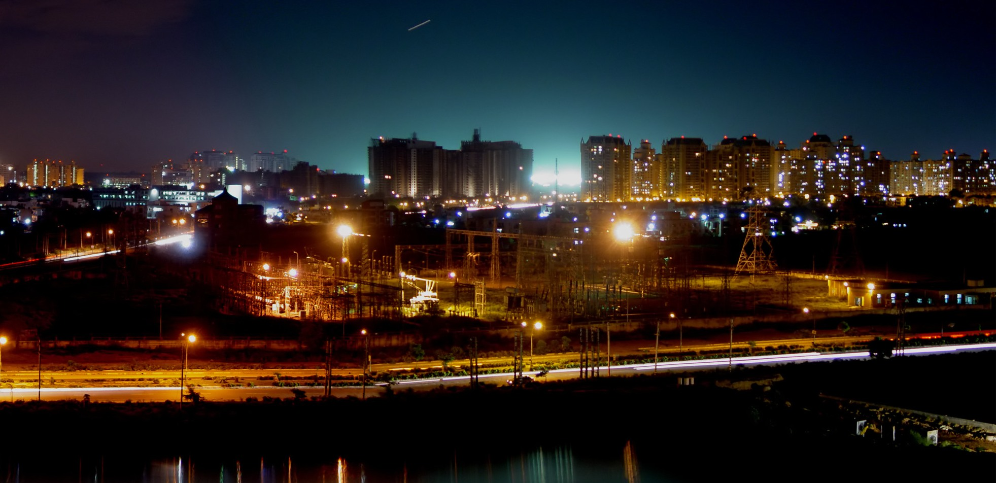 Gurgaon Night Skyline